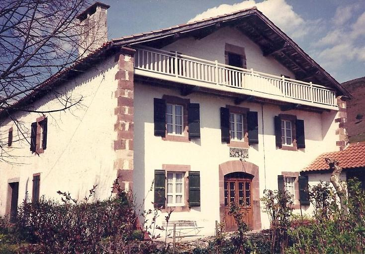 Okotz (Baigorri, Nafarroa Beherea))